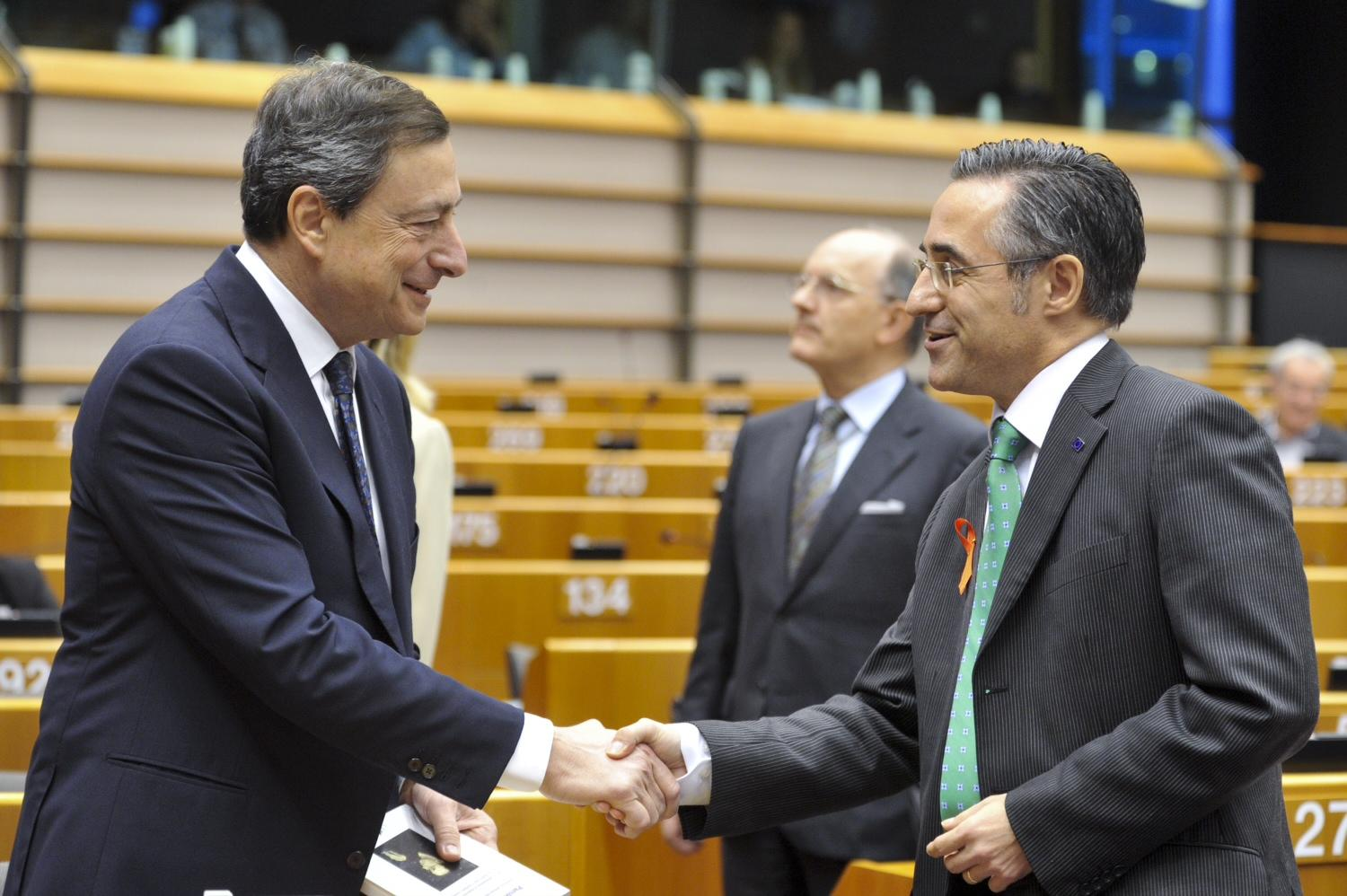 Ramon Tremosa i Mario Draghi, president del BCE, al Parlament Europeu de Brussel·les 1-12-2011